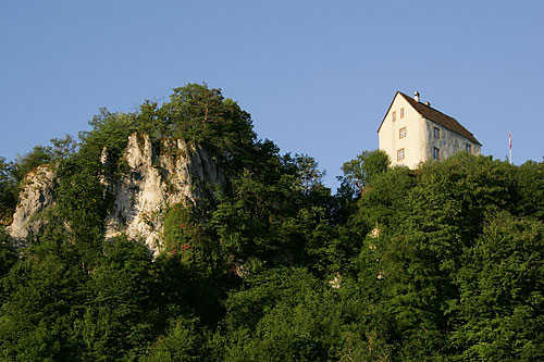 Burg in Burg im Leimental